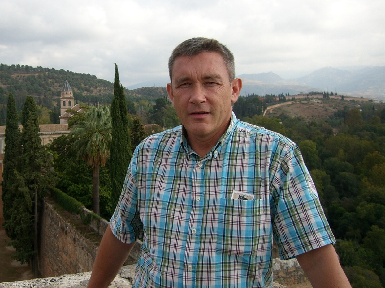 Hervé Sebille Kernaudour